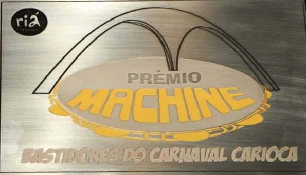 Imagem doTroféu Prêmio Machine - Bastidores do Carnaval Carioca